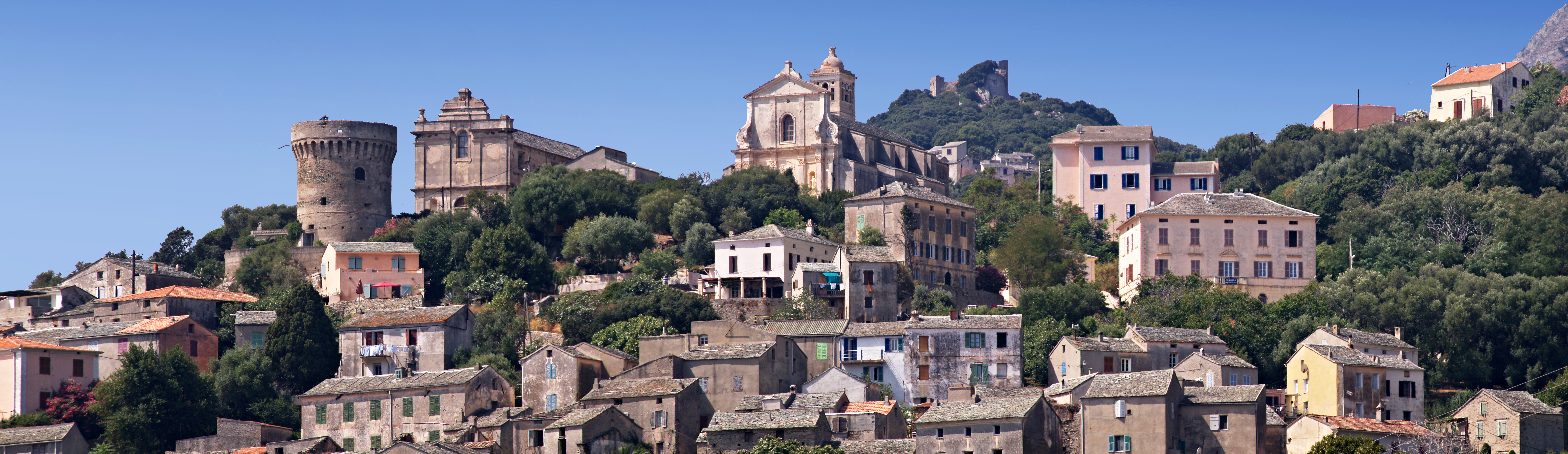 Rogliano (Corse) - Panorama de Bettolacce